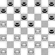 Слепая партия